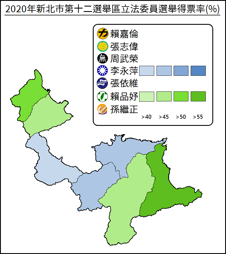 2020年新北市第十二選舉區立法委員選舉得票